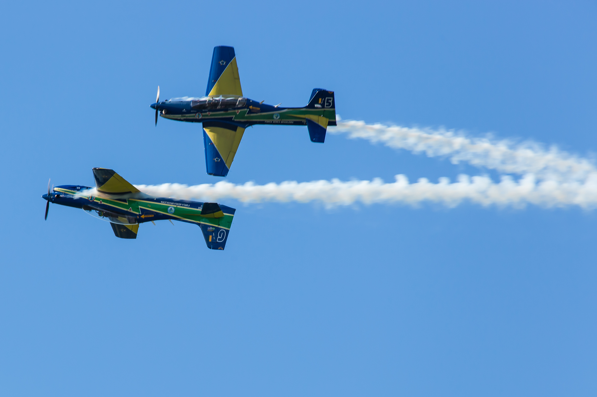 Kartódromo Arena Schincariol, Itu/SP